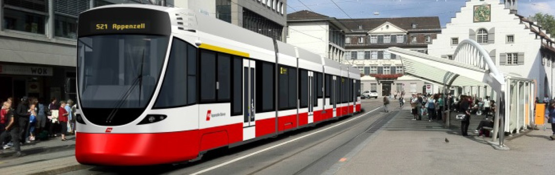 Fotomontage mit einem zukünftig nach Appenzell fahrenden Zug der Appenzeller Bahnen auf dem Marktplatz in St. Gallen